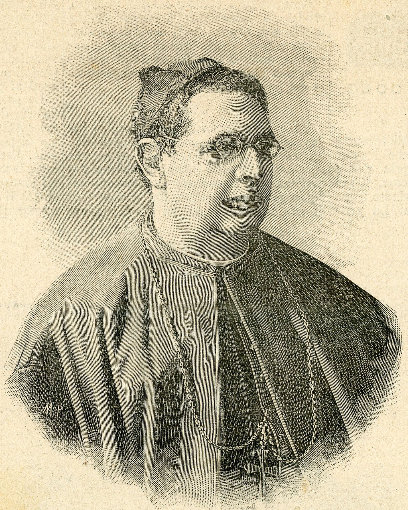 Monsignor Geremia Bonomelli, vescovo di Cremona (xilografia).